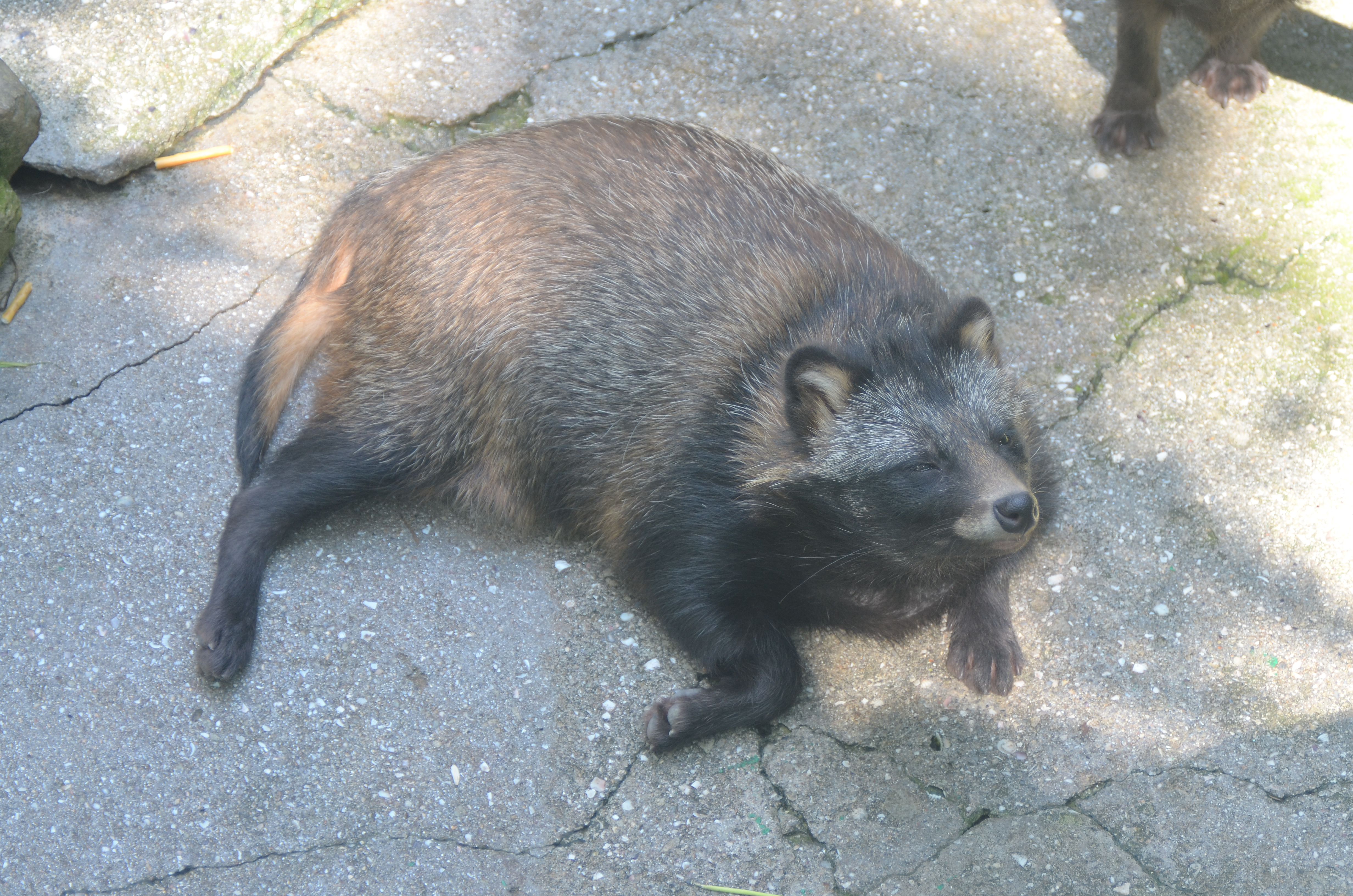 Ялтинский зоопарк.